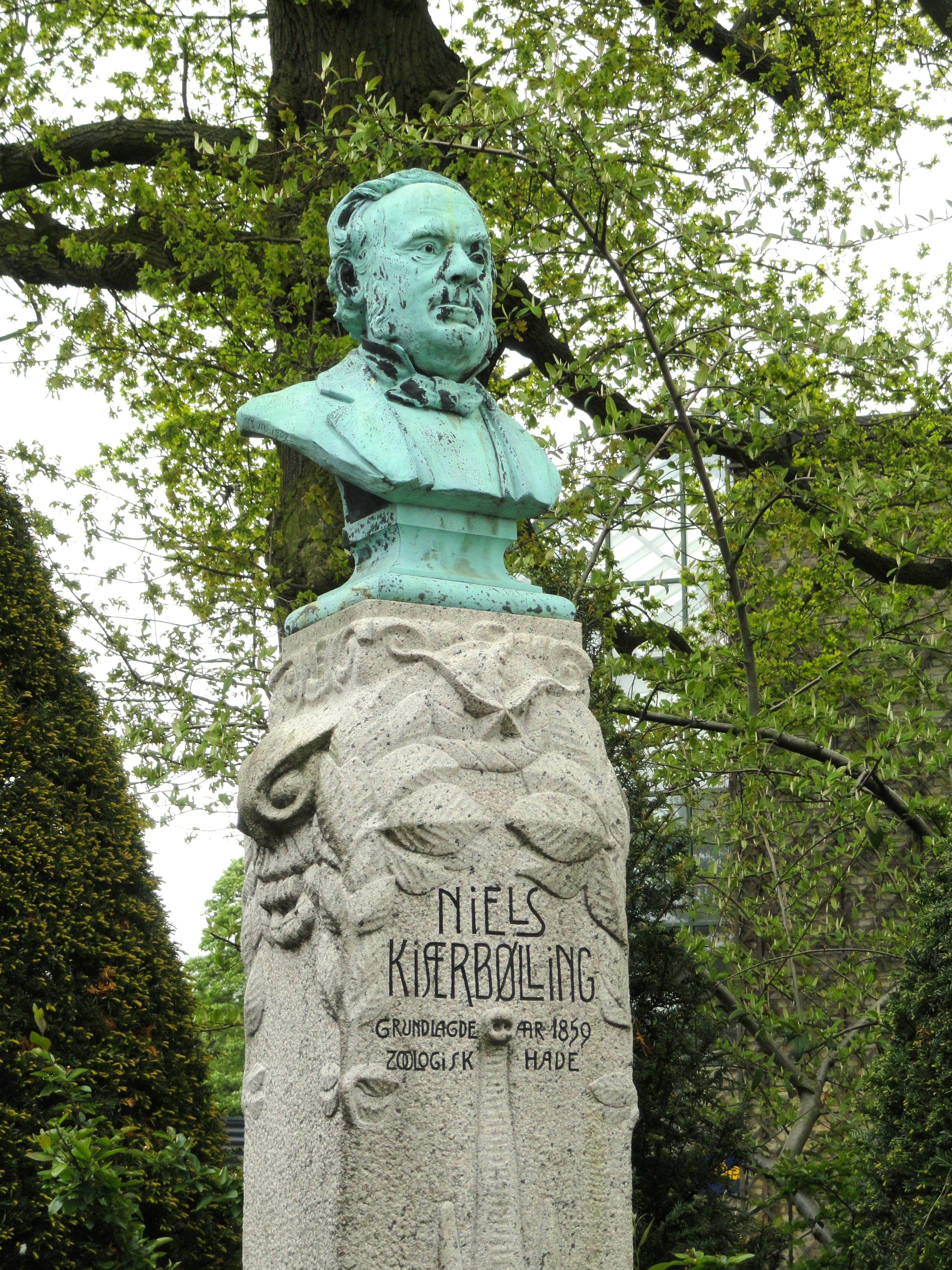 Copenhagen Zoo, Frederiksberg, Copenhagen, Denmark.